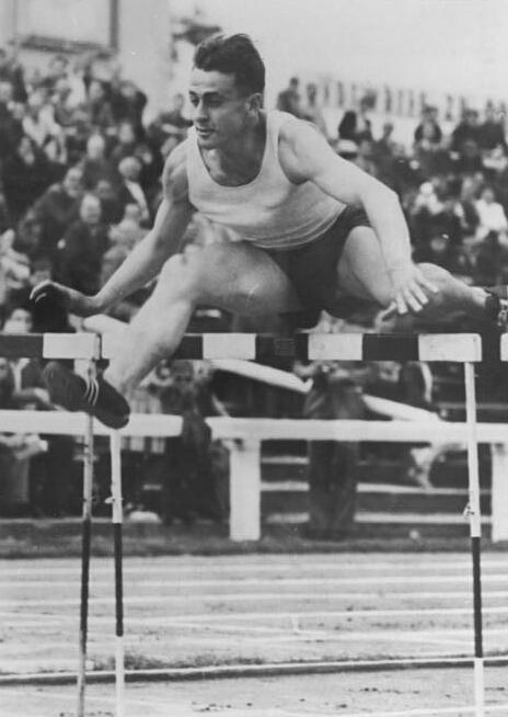 Schank Zentralbild 3 Motive 27.7.1954 DDR-Leichtathletik-Meisterschaften im Dresdner Harbigstadion Juli 1954. UBz: 110 m-Hürden-Vorlauf Schenk (Rostock) - DDR-Meister im 200 m Hürden.